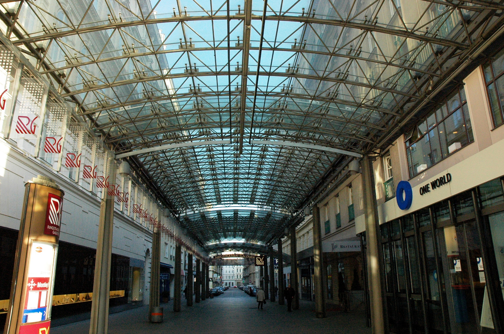 Ringstraßen-Galerien in der Inneren Stadt / Wien